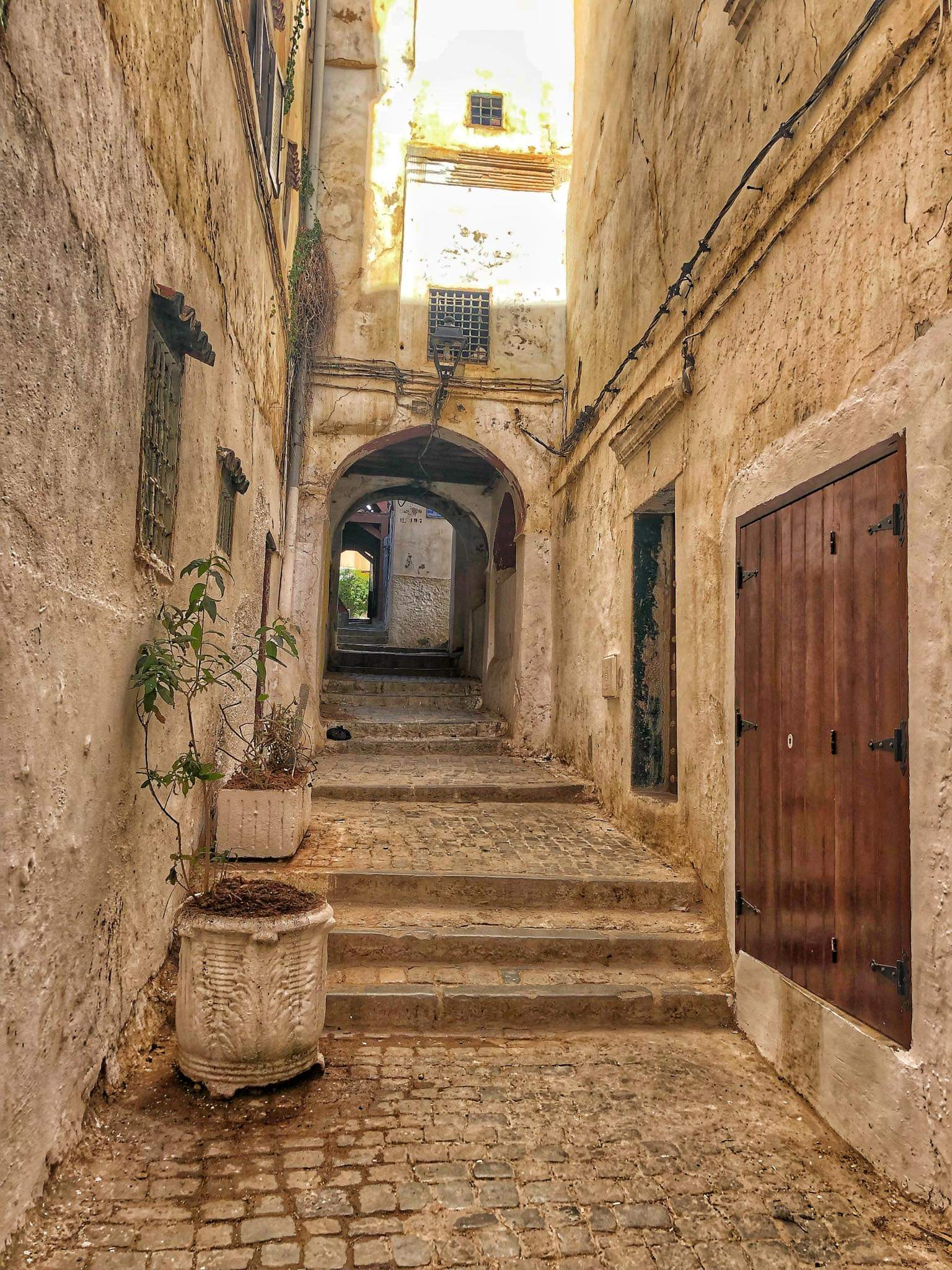 La Casbah est un endroit situé dans la capitale d'Algérie : Alger Connue pour son charme et son style ancien, elle attire des milliers de visiteurs par an This is an image with the theme "Africa on the Move or Transport" from: Algeria